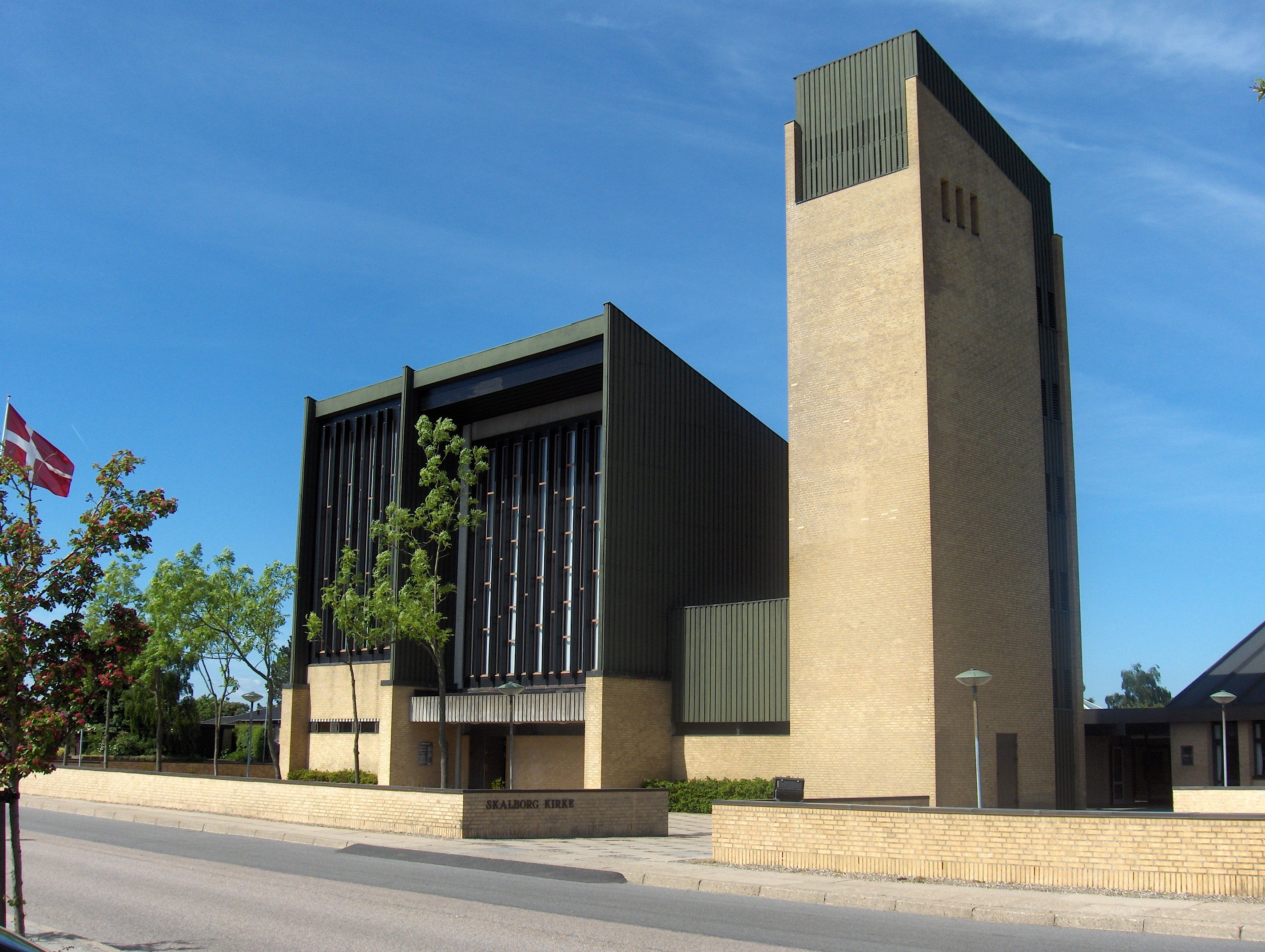 Skalborg Kirke i Aalborg